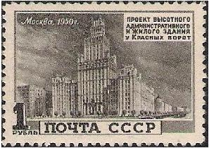 Почтовая марка СССР. Проект высотки у Красных ворот